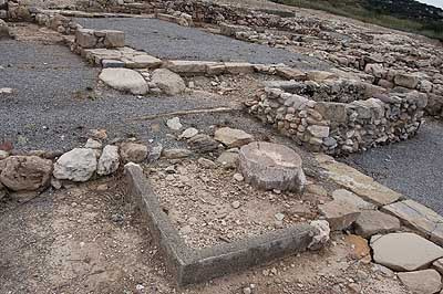 Mehr Informationen zu Kreta auf meiner Homepage: Kreta – Mein erstgeborenes Land Minoan archaeological site of Petras, East Crete, Greece